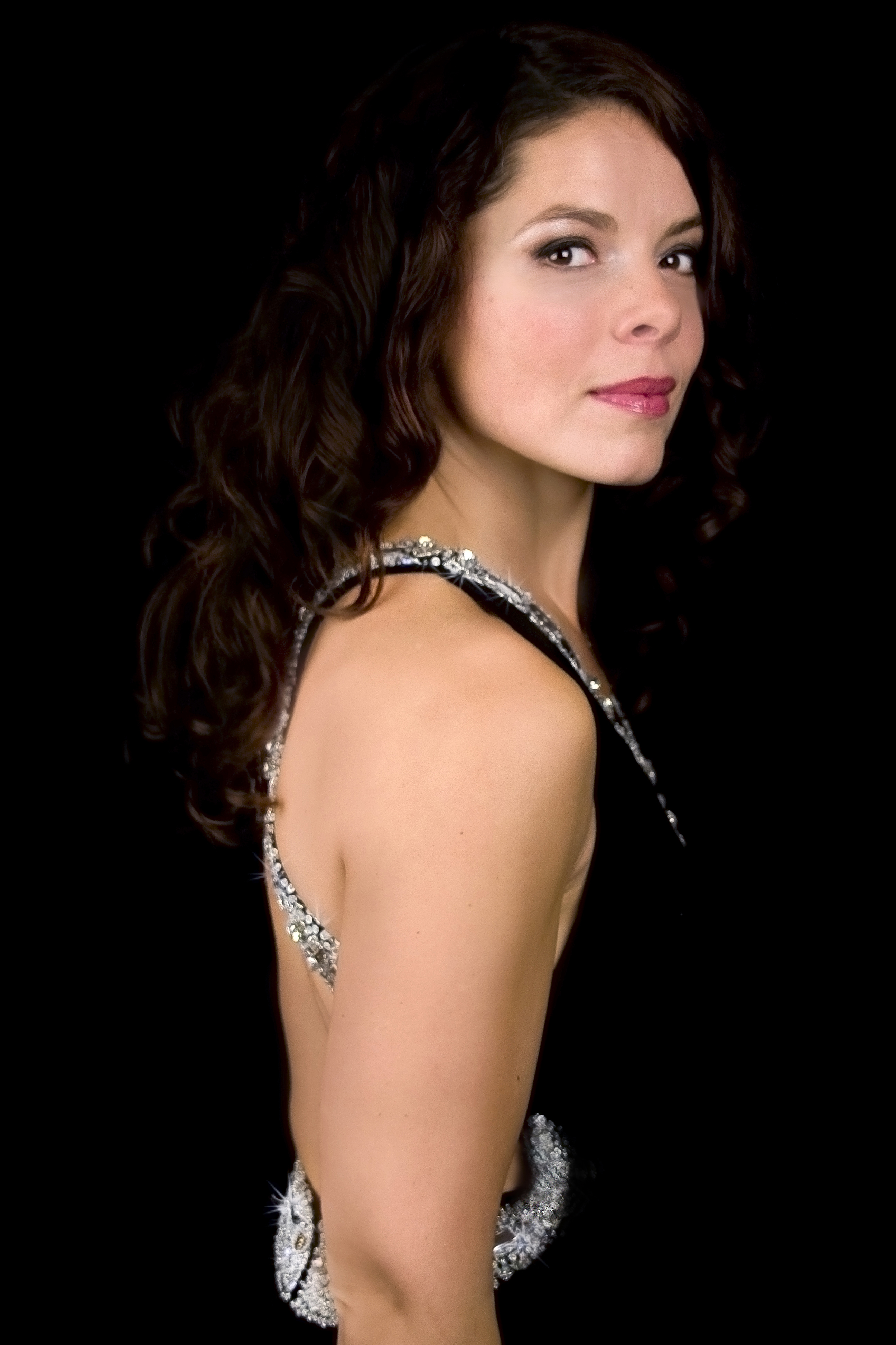 Operasångaren Katija Dragojevic